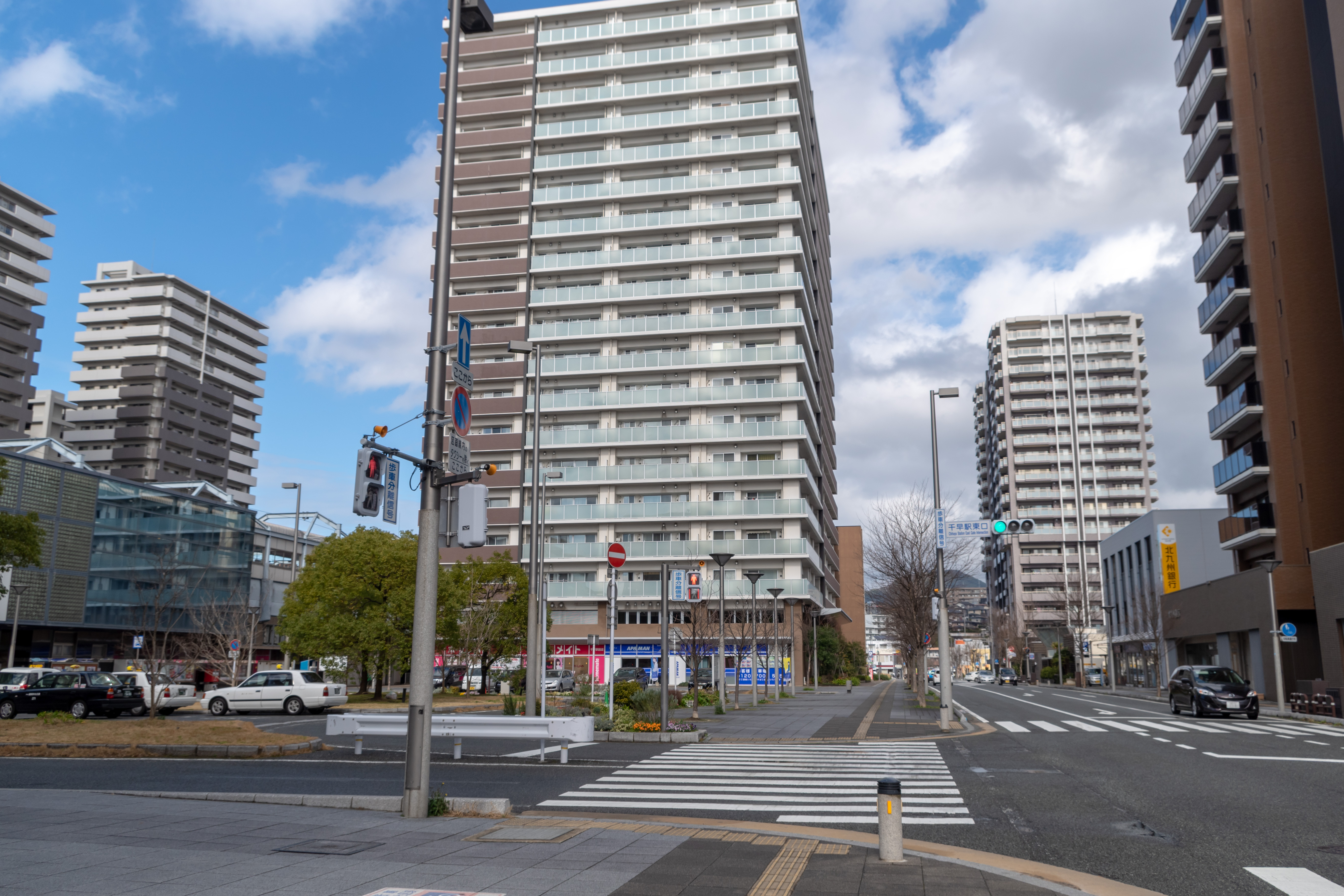 千早駅東口前